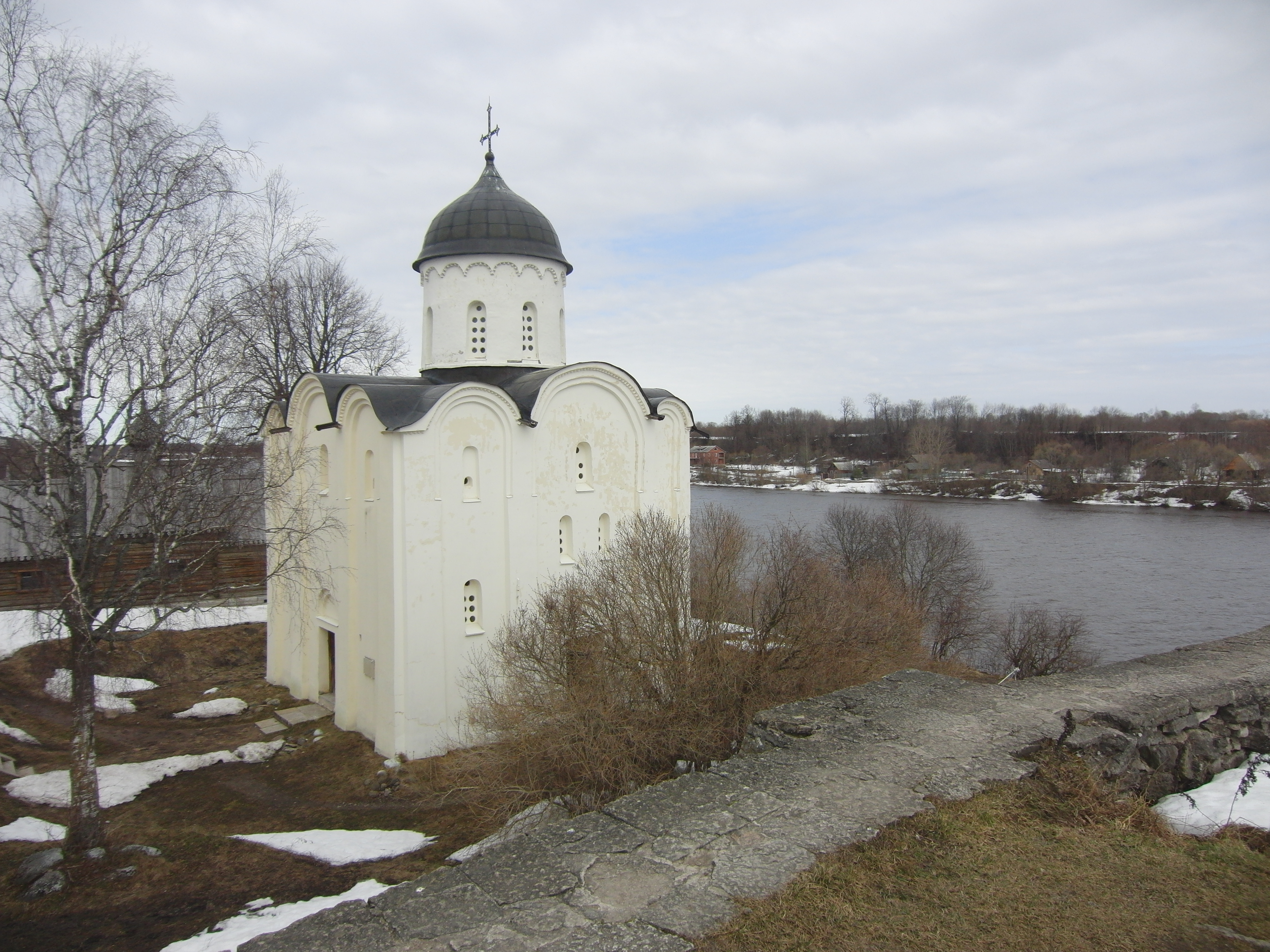 Церковь Георгия: Старая Ладога, Волховский район, Ленинградская область